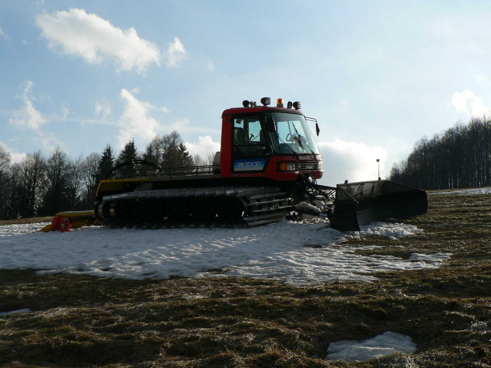 Sněžná rolba na svahu v Loučné nad Desnou koncem sezóny